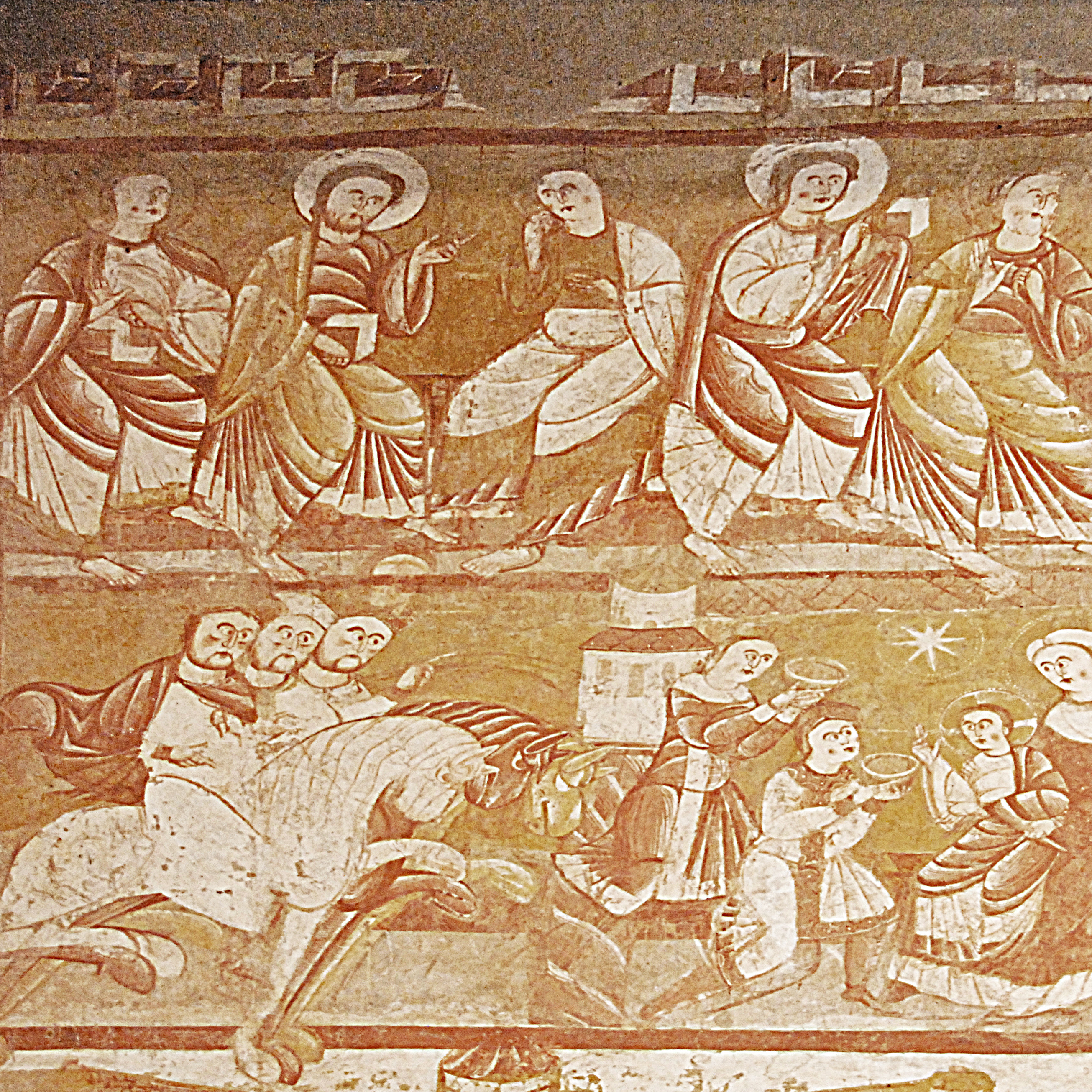 Schiff, Ostwand, Jesus mit Jüngern, Anbetung der drei Könige